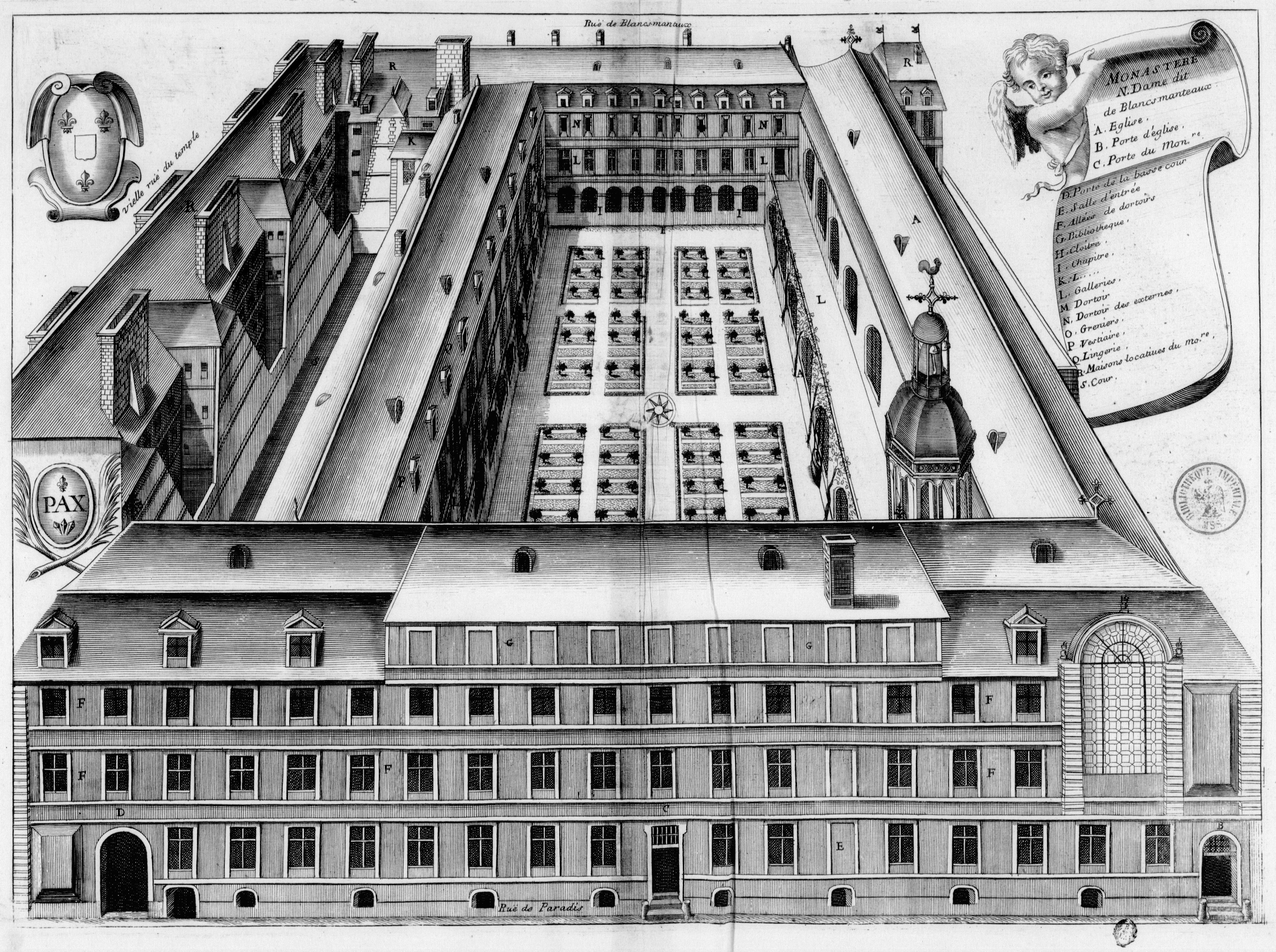 Planche gravée du 17ème siècle représentant le monastère des Blancs-Manteaux en France, dans le livre Monasticon Gallicanum.